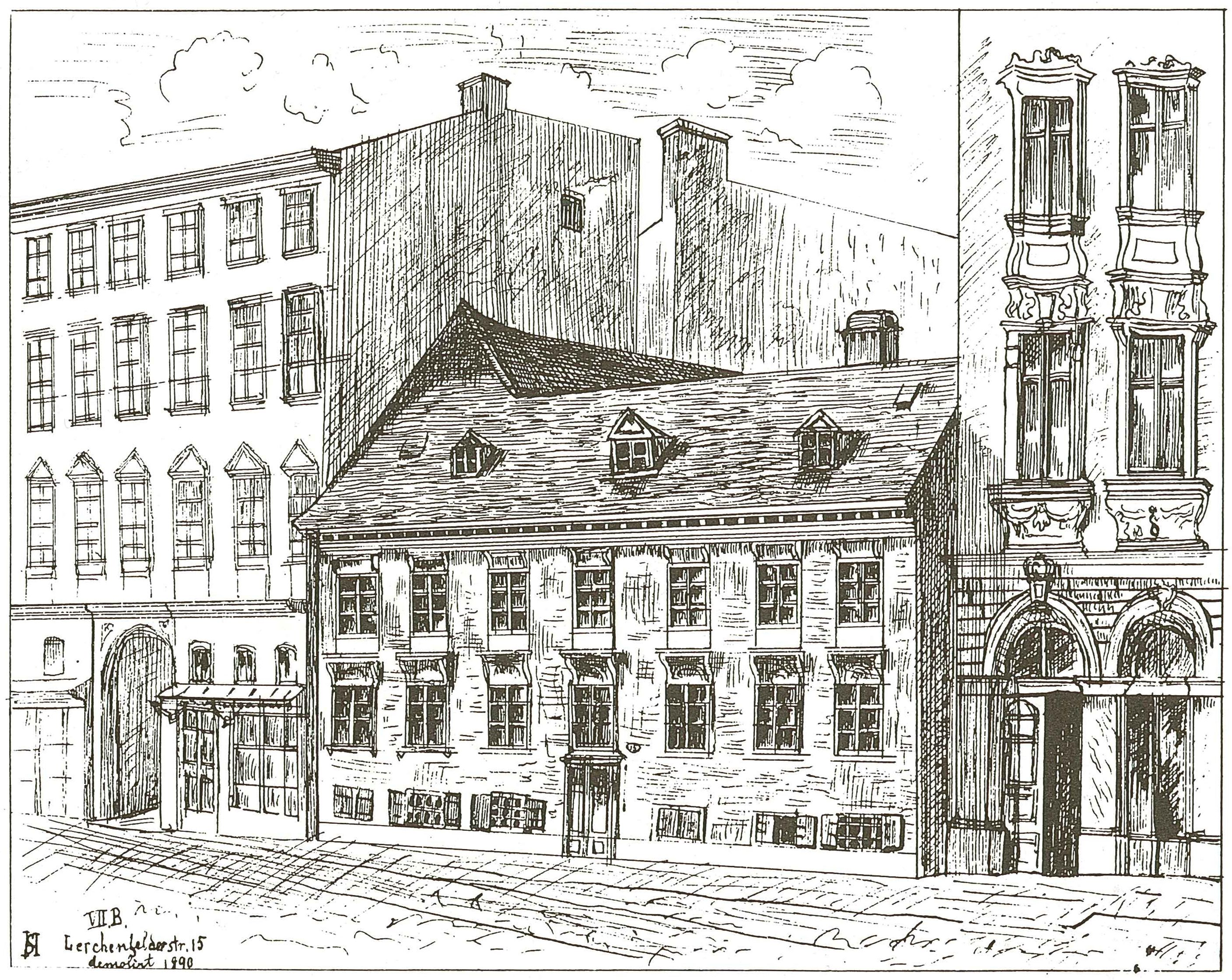 Lerchenfelder Straße 15; then St. Ulrich, today Neubau, Vienna, 7. district:Birthplace of Johann Strauss IIGeburtshaus von Johann Strauss (Sohn)The building was demolished in 1890. / Das Haus wurde 1890 abgerissen.